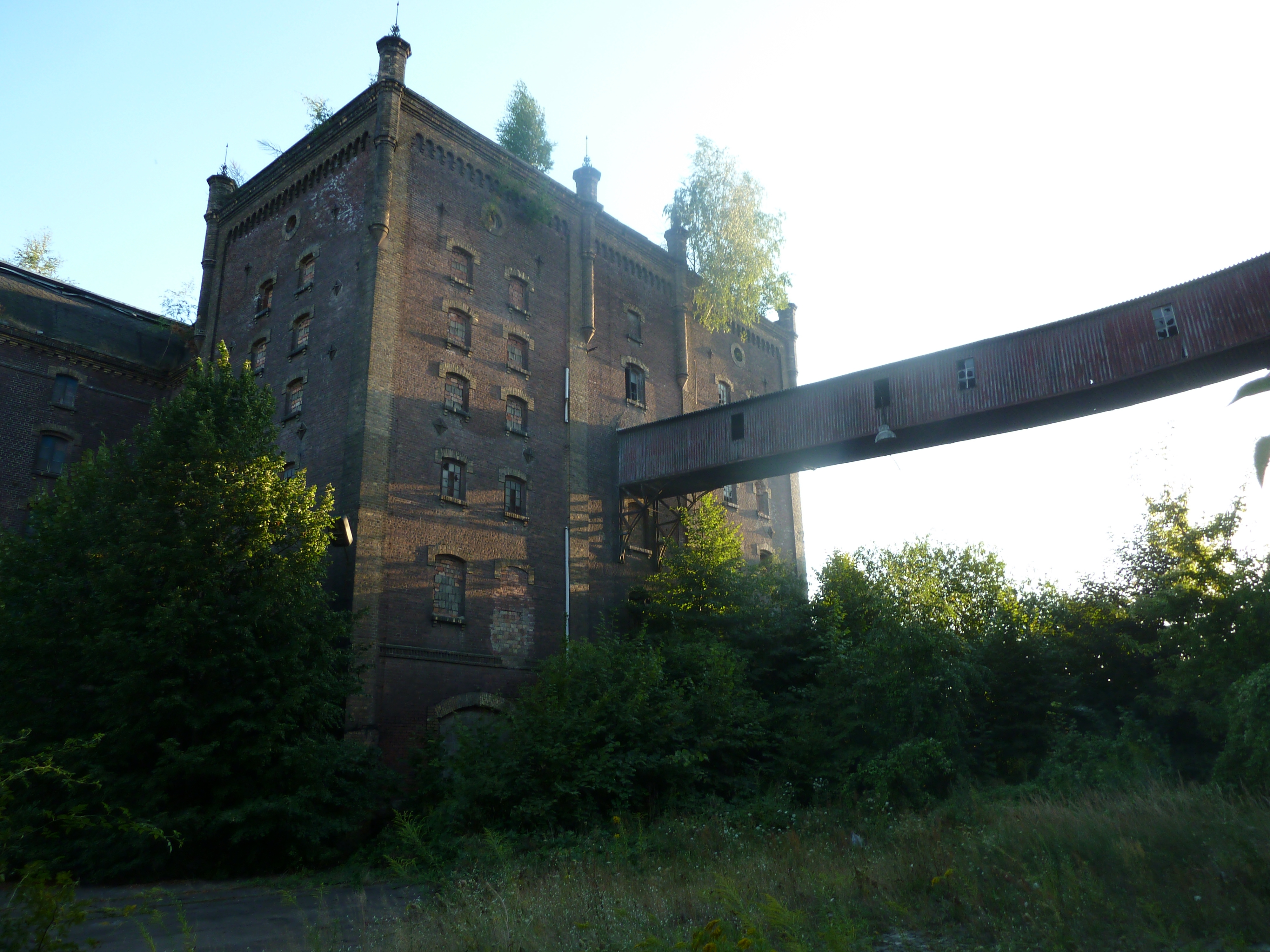 Köthen, ehemalige Malzfabrik